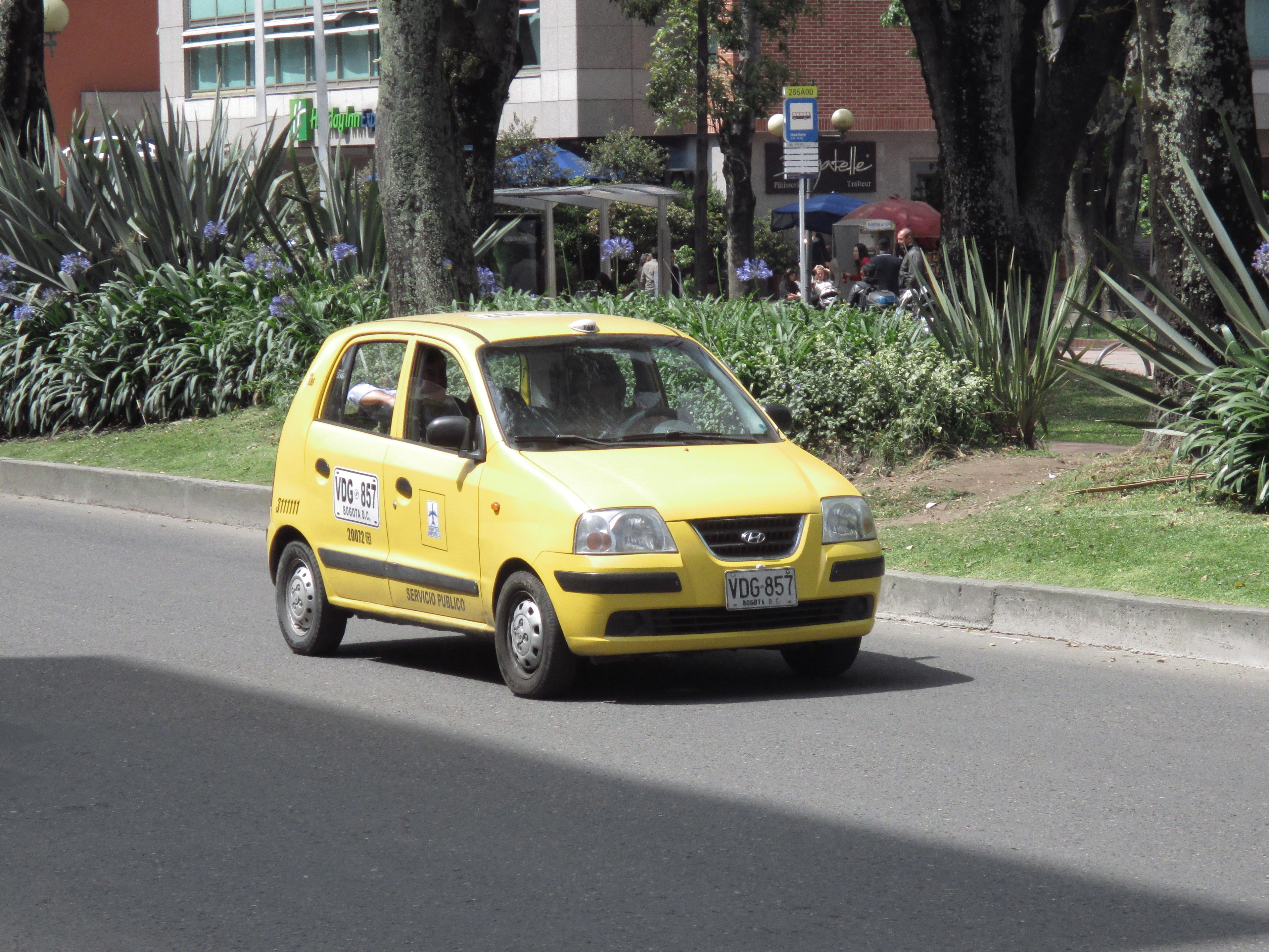 Taxi en Bogota